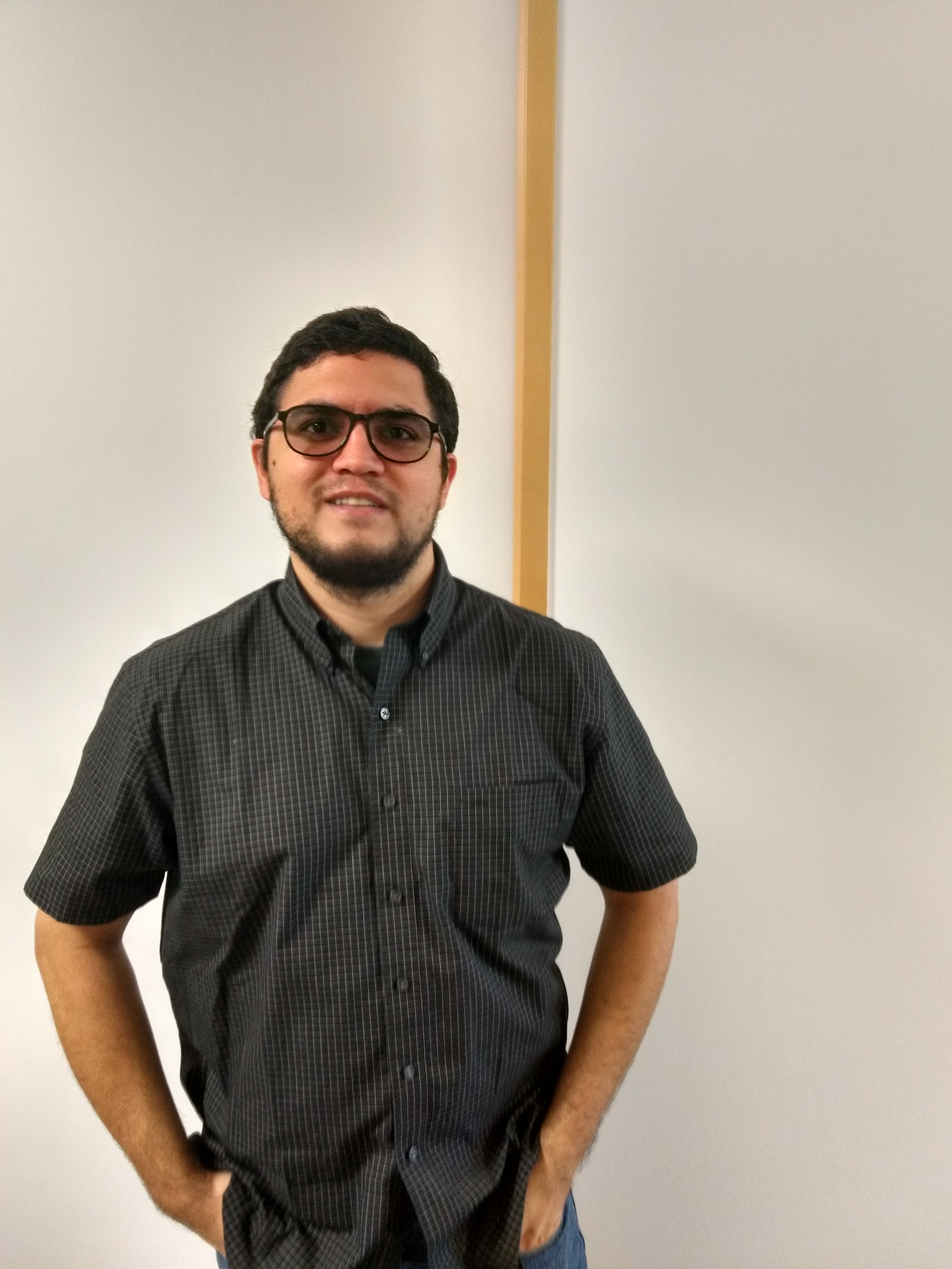 Luis Carlos Díaz a la Ràdio de la Universitat Politècnica de València, abans de gravar per a La Represa.